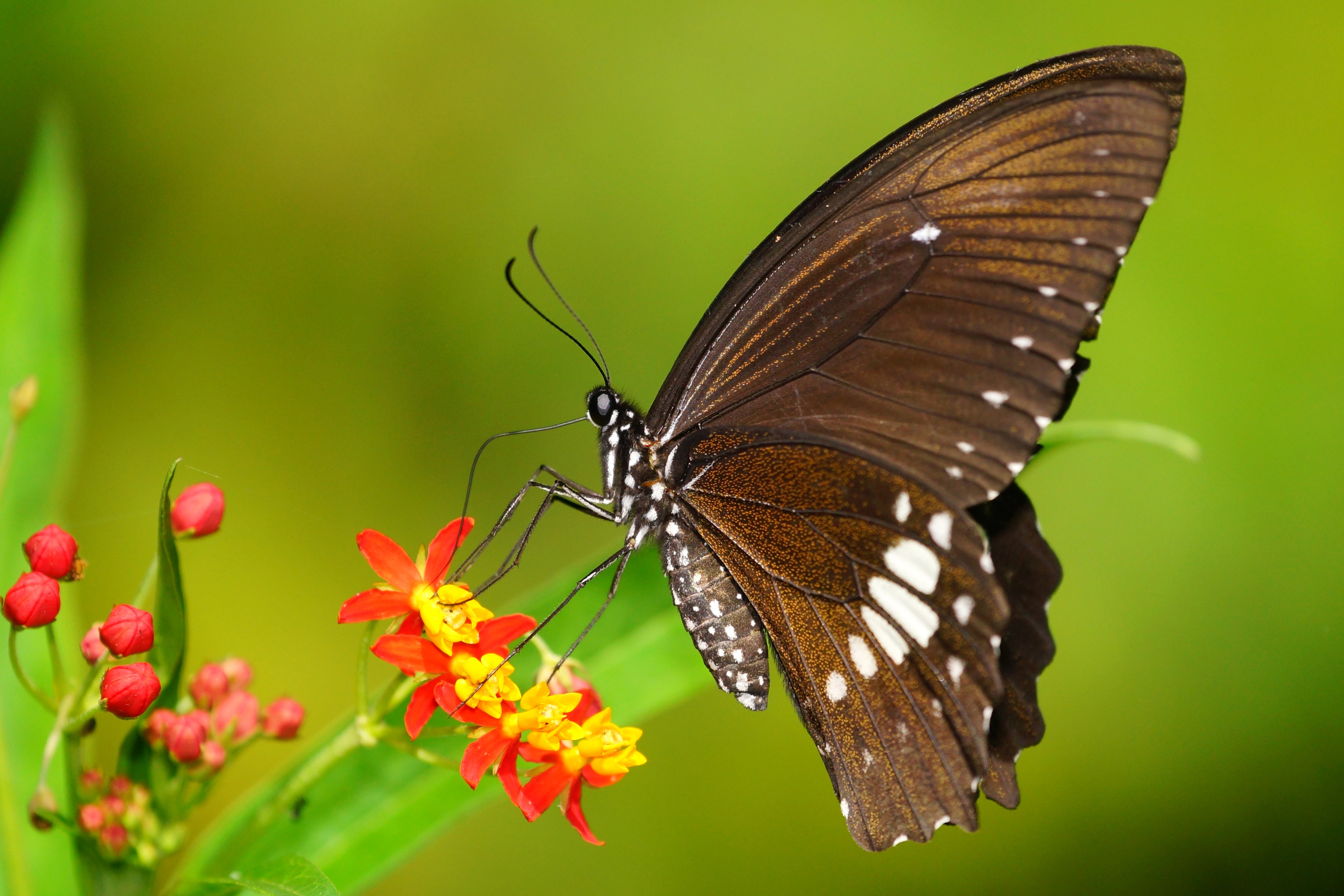 無尾白紋鳳蝶 Papilio castor formosanus